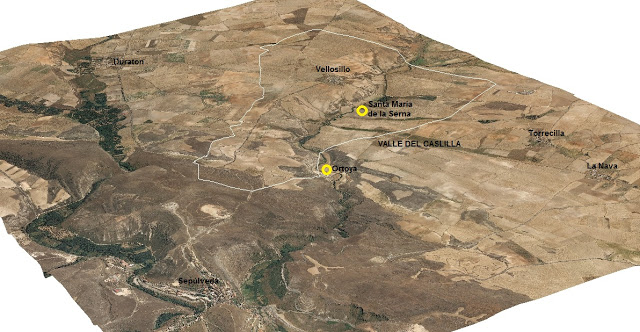 imagen tridimensional del valle del Caslilla con la posicion de las aldeas